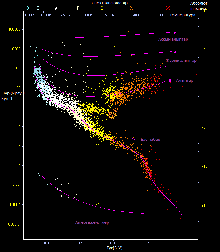 Герцшпунг-Рассел диаграммасы